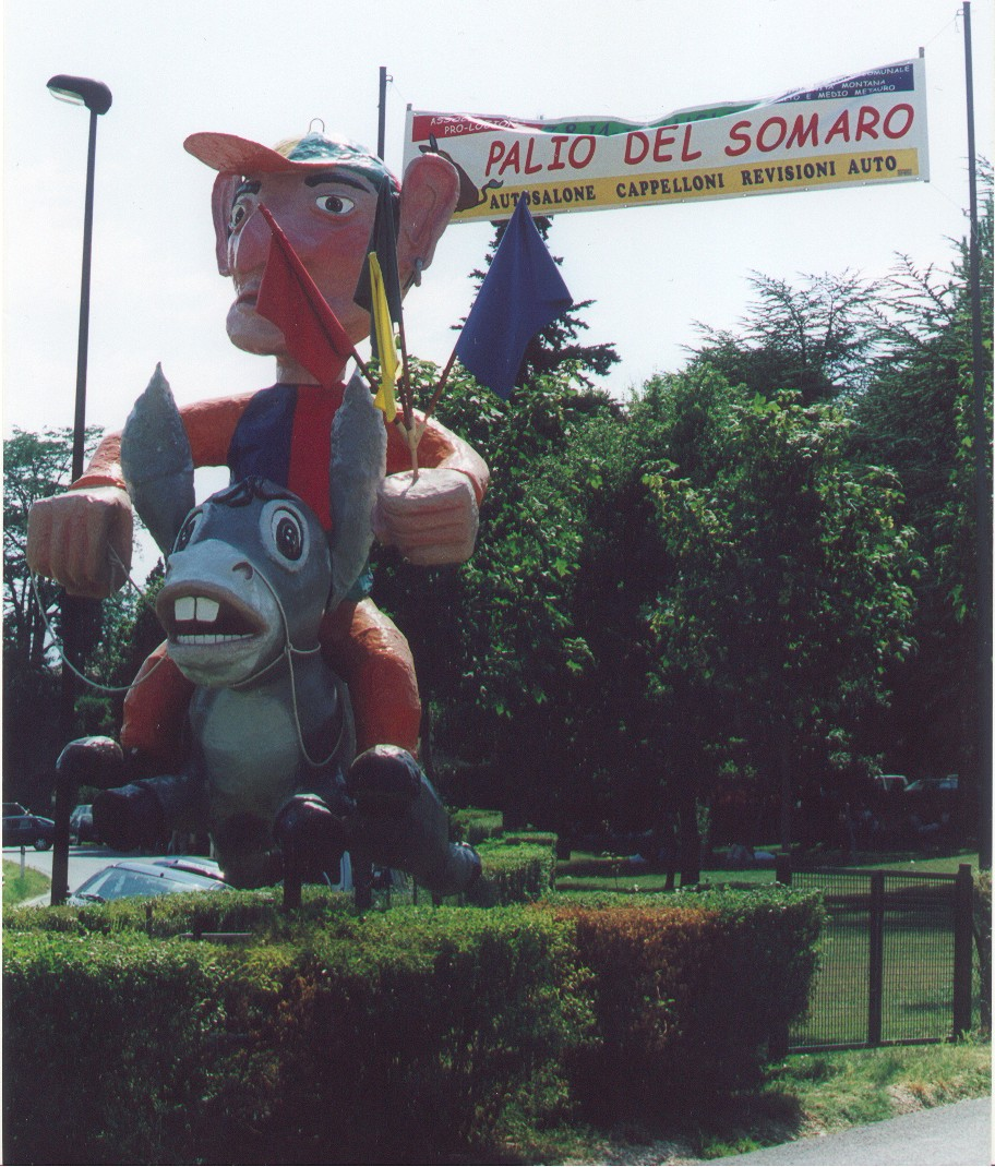 Palio del Somaro Mercatello sul Metauro Marche Italy